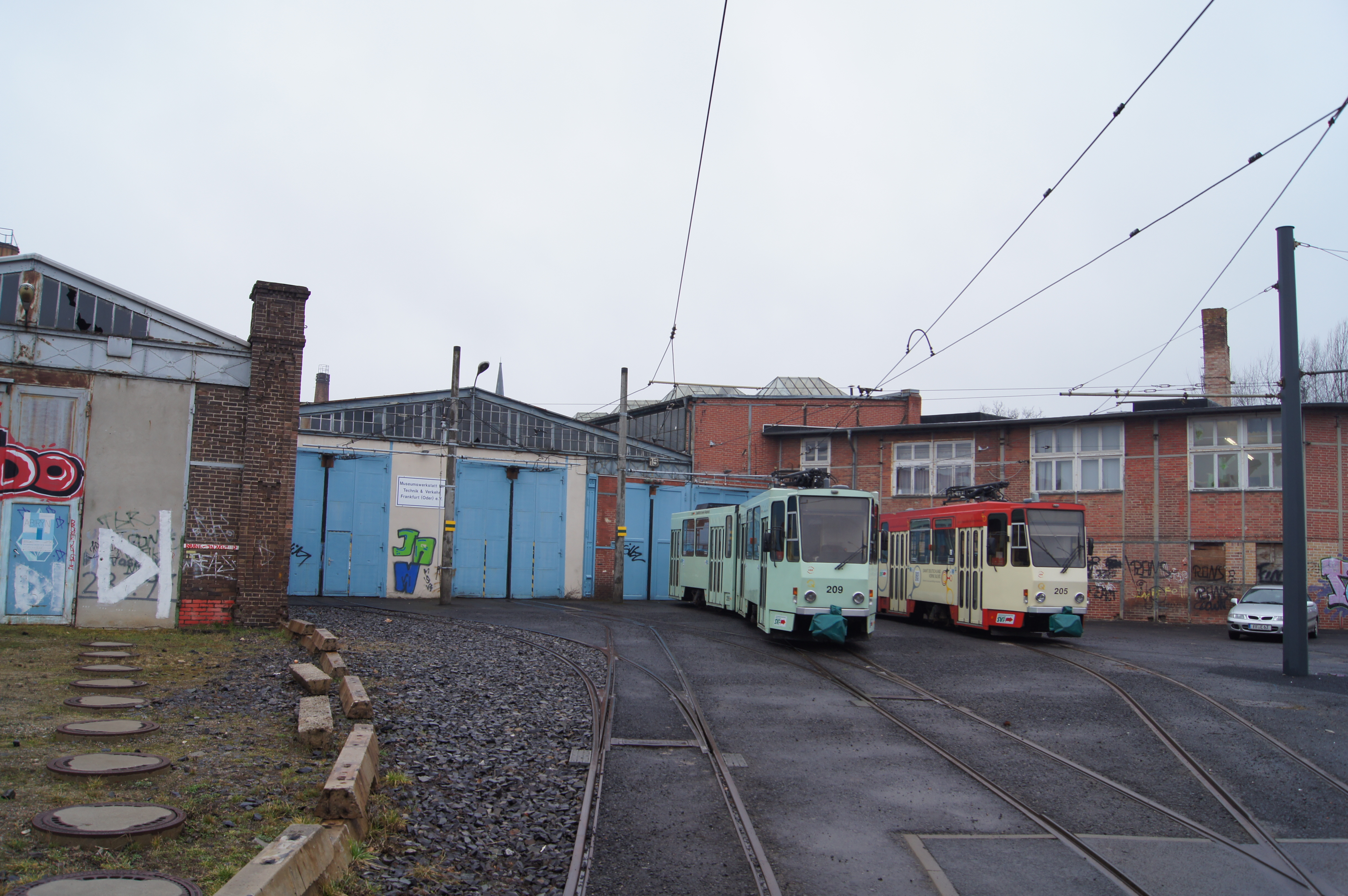 Ehemaliges Straßenbahndepot in Frankfurt (Oder), Brandenburg, Deutschland